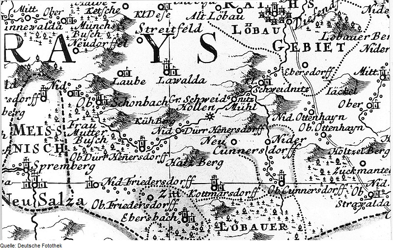 Original image description from the Deutsche Fotothek Dürrhennersdorf. Karte des Bautzener Kreises von den Homannschen Erben, 1746 (Sign.: VII 72)